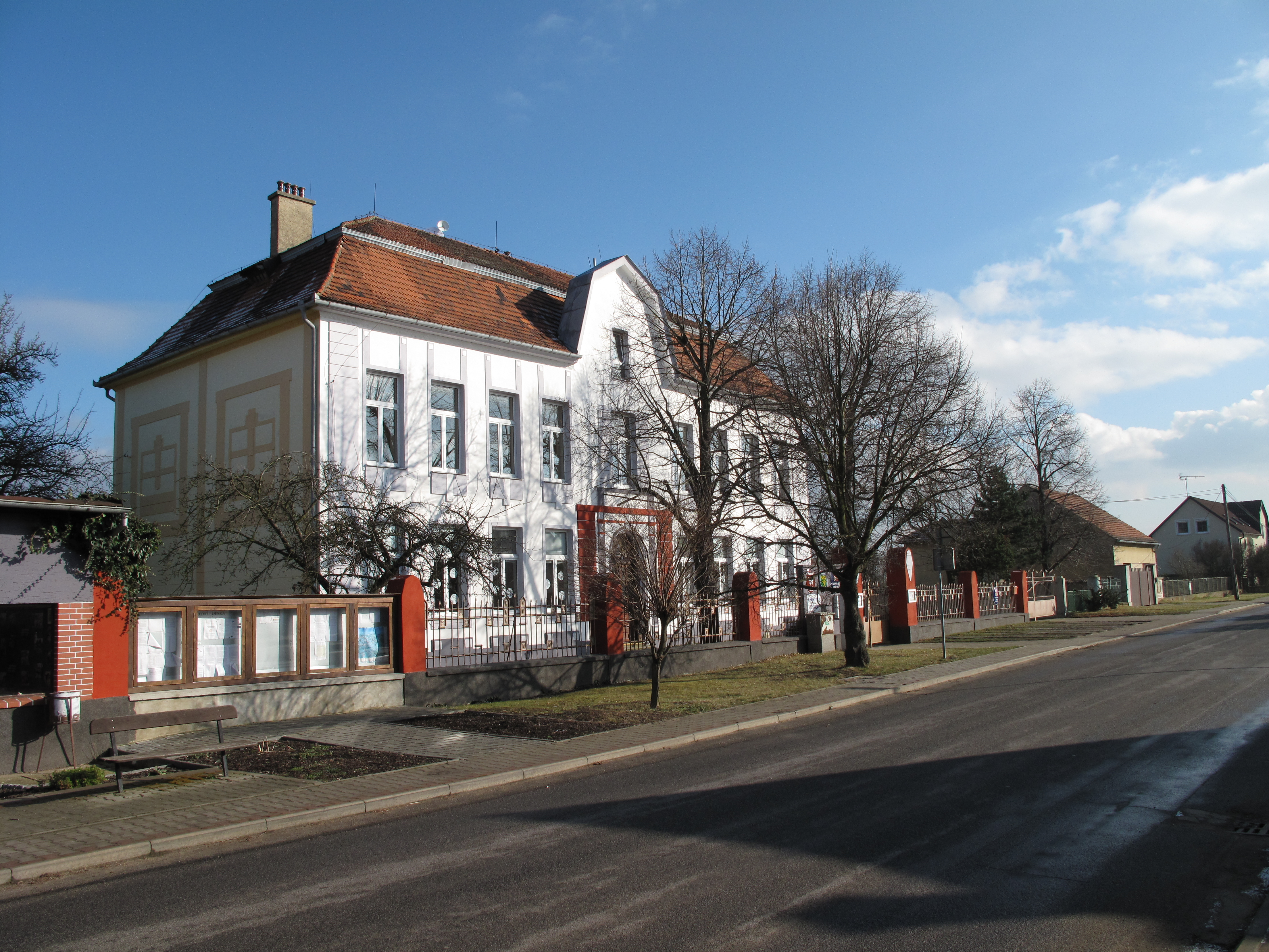 Úřad v Dušníkách. Okres Litoměřice, Česká republika.